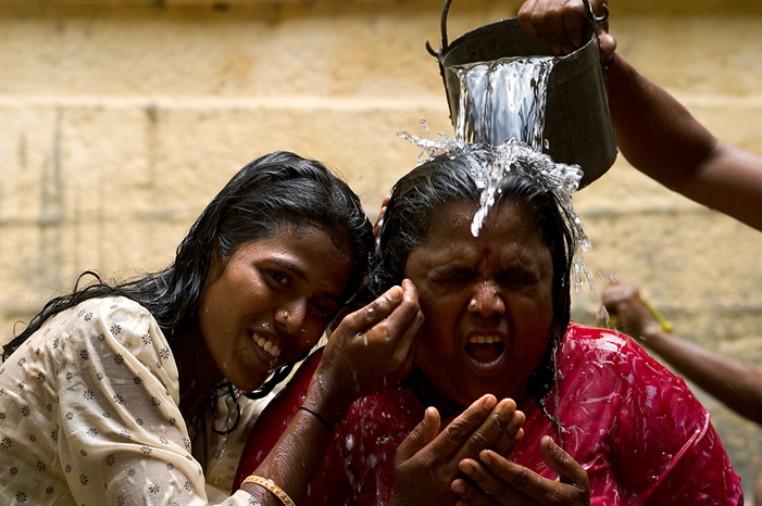 A Hindu ritual involving water in Alagarkoil, near Madurai, Tamil Nadu, India.